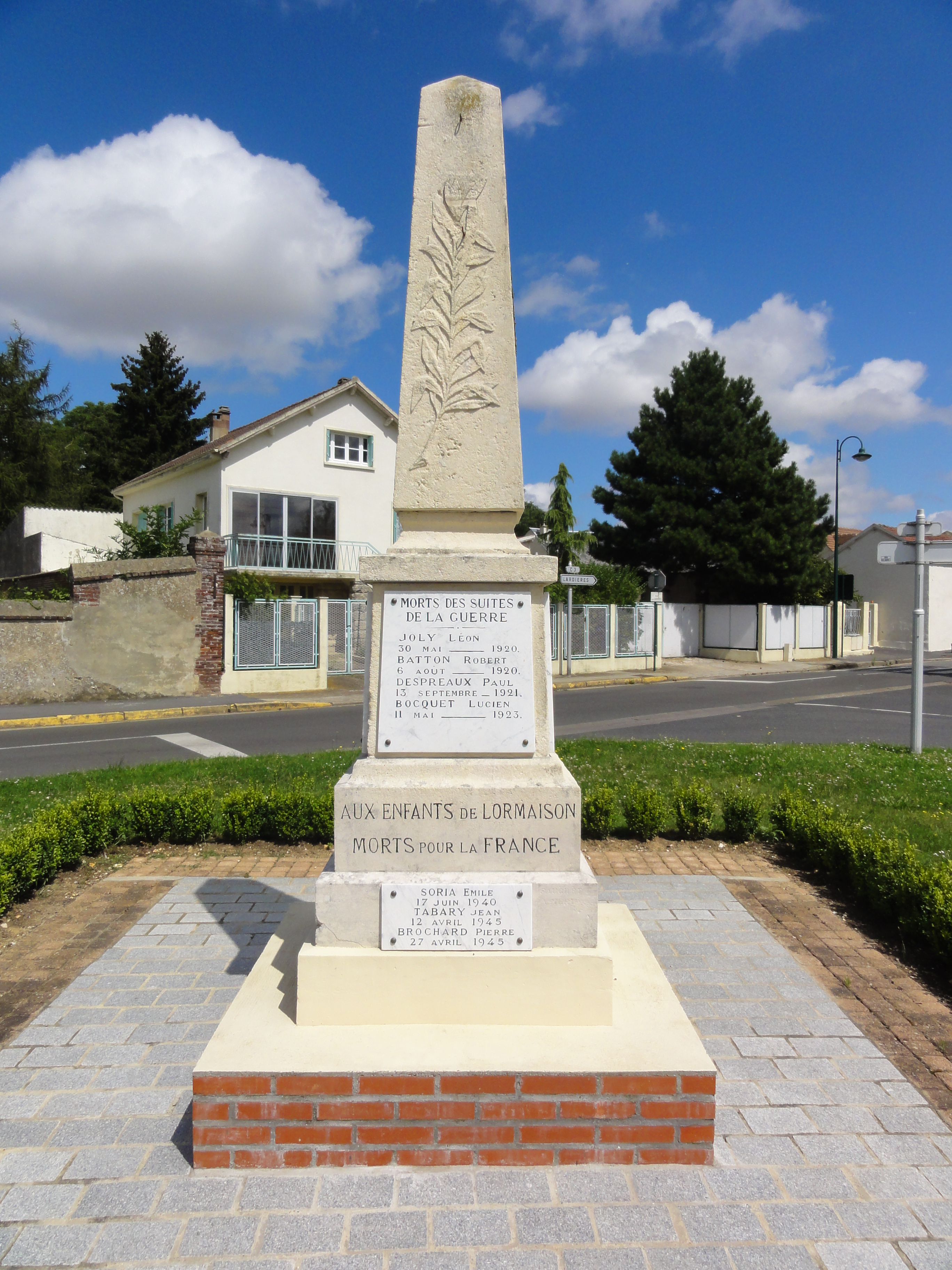 Monument aux morts de Lormaison dans l'Oise